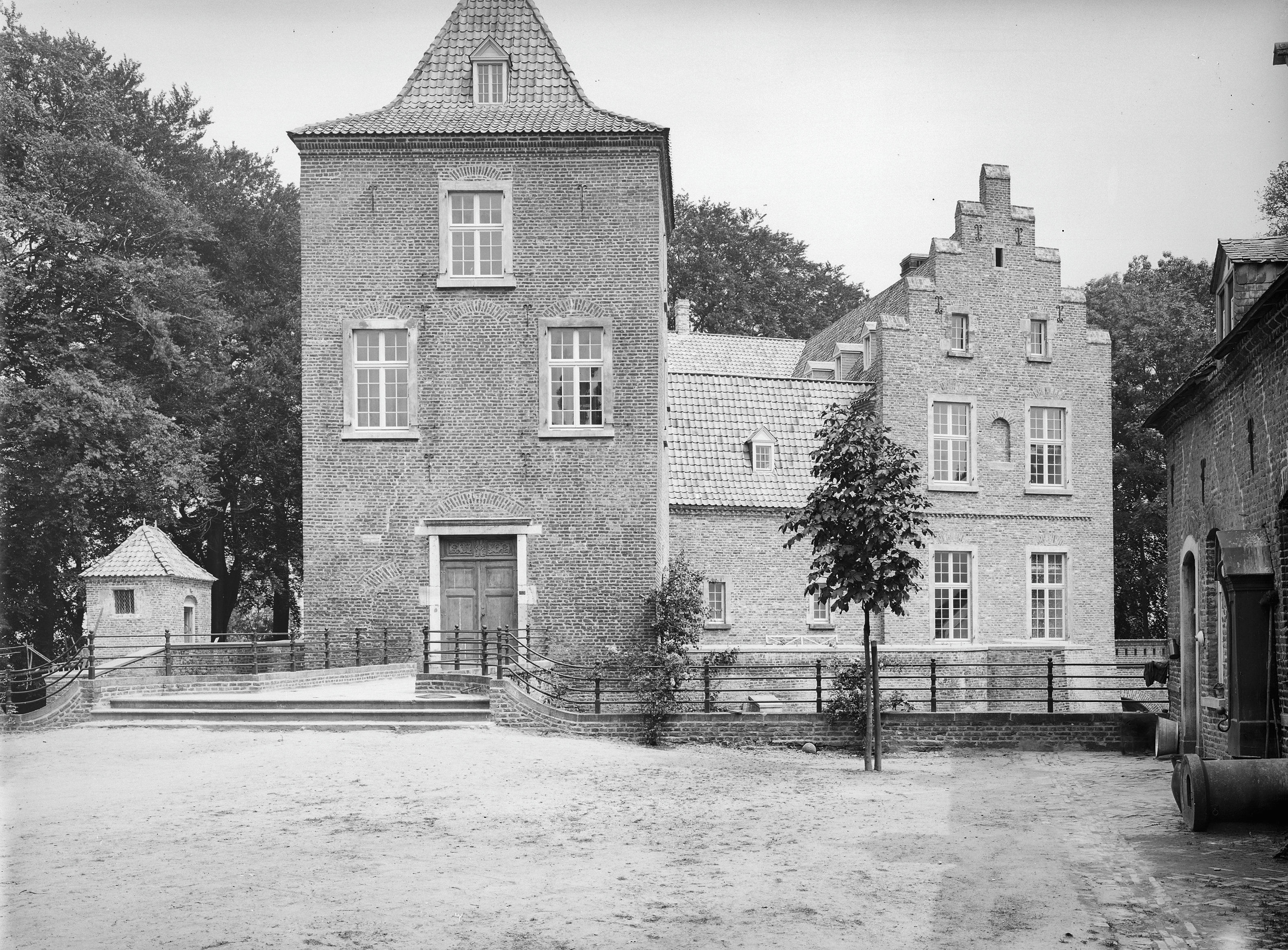 Kasteel Geysteren: west kant